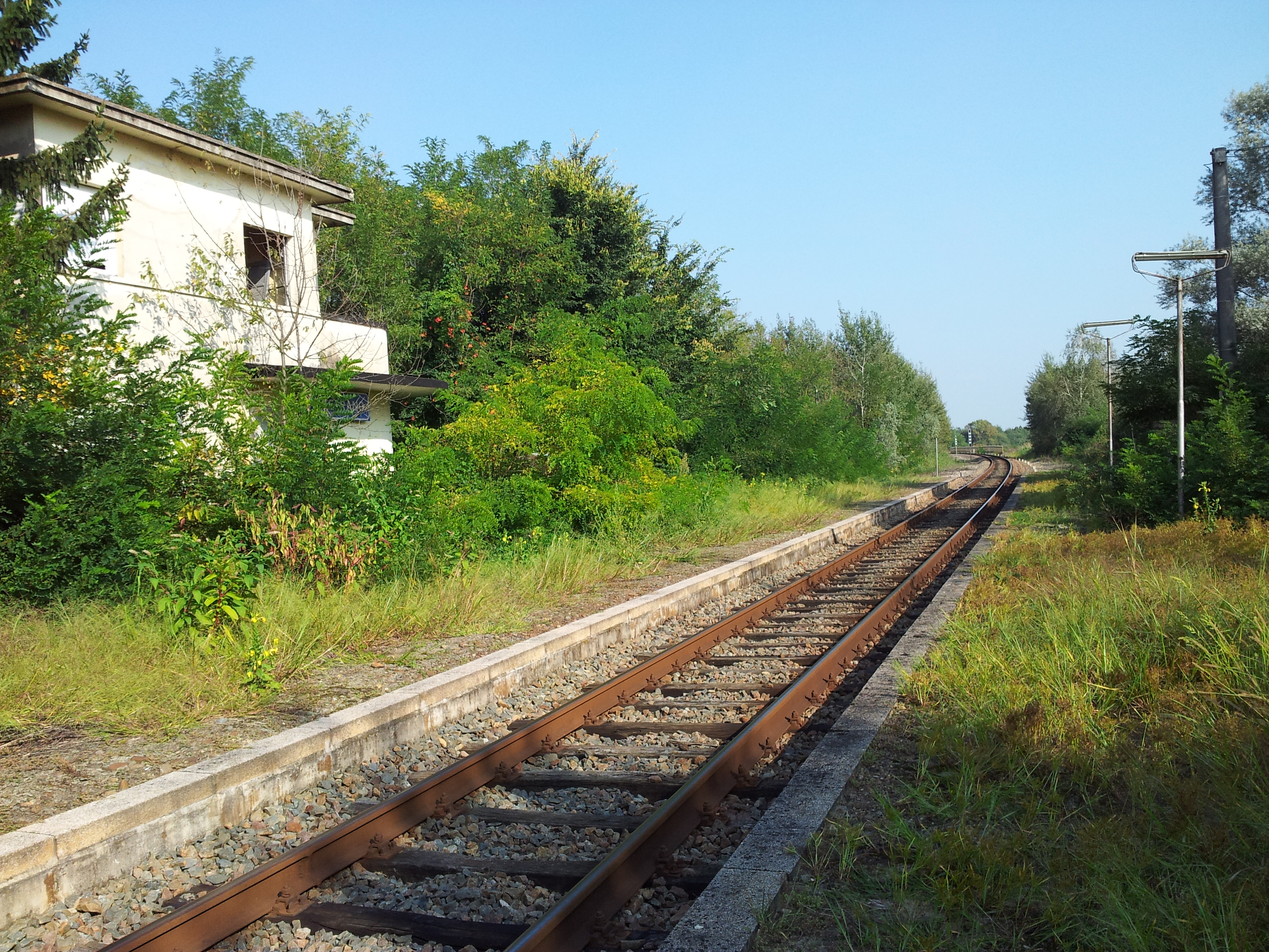 Fermata lato binari in direzione Novara, custodita dalla vegetazione.